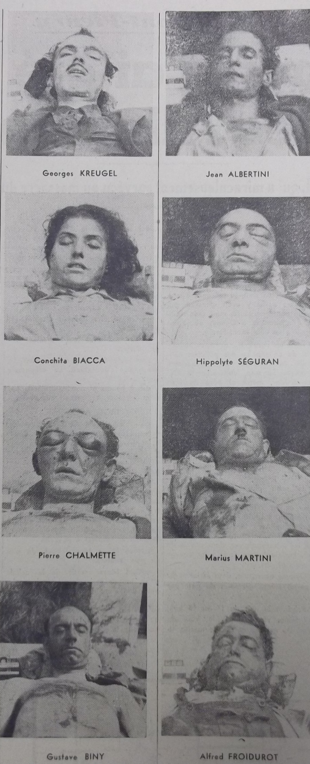 Source le journal L'Ergot du 21 décembre 1944